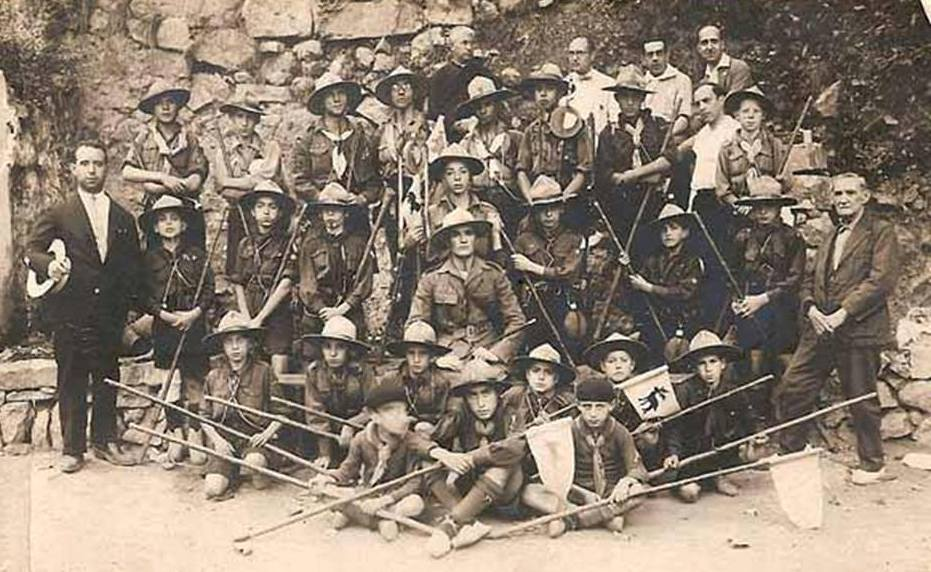 Agrupación de Tortosa de los Exploradores de España 1927-28